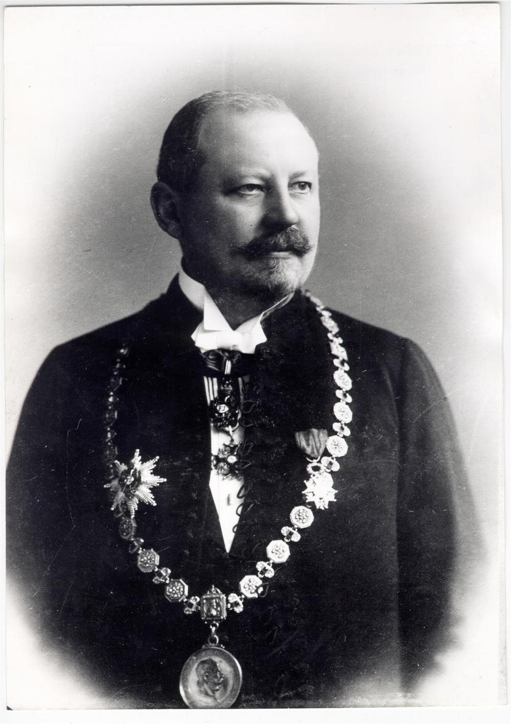 Pražský primátor Karel Groš